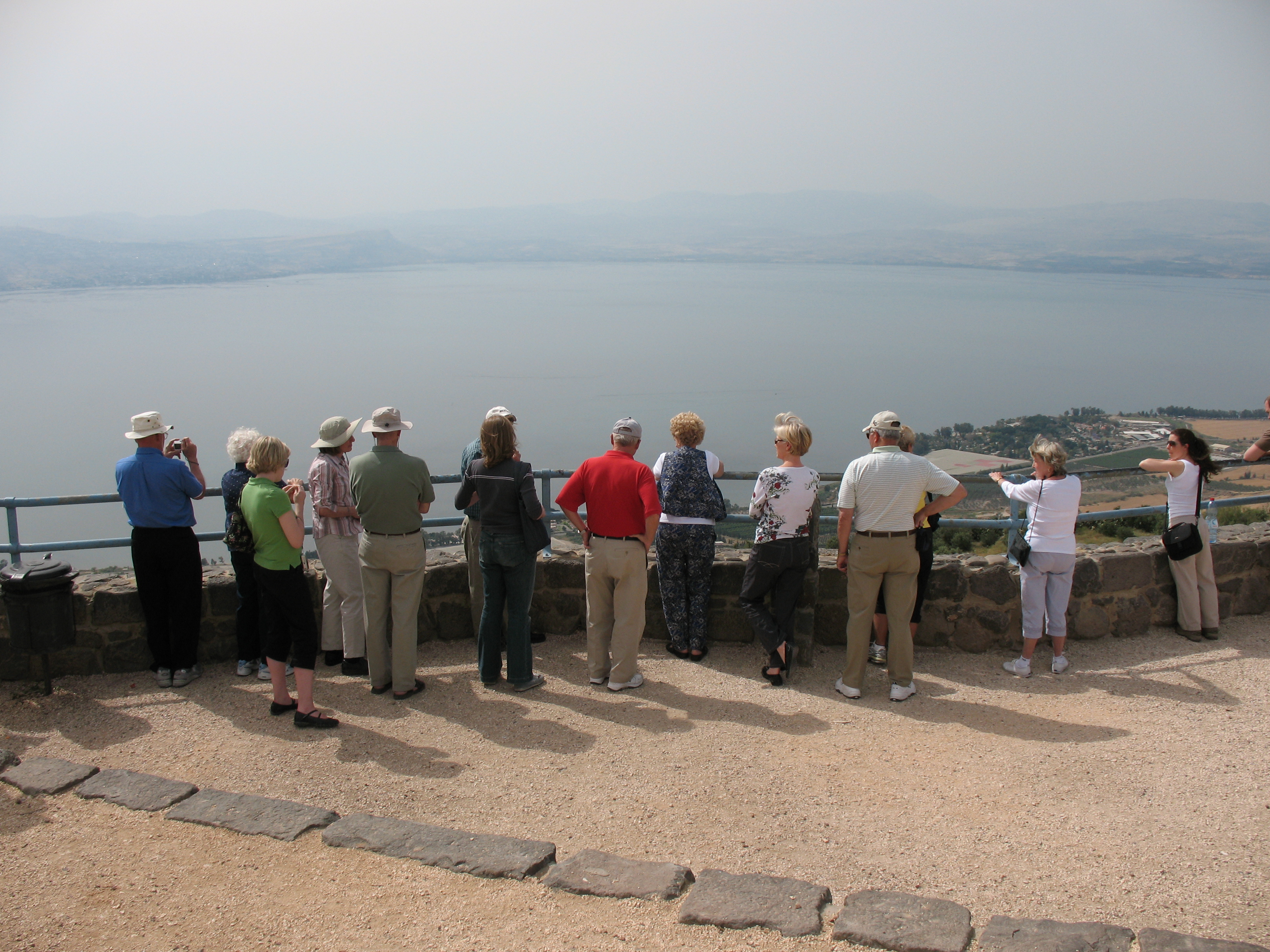 Golan Heights Overlook_0992 Golan Heights